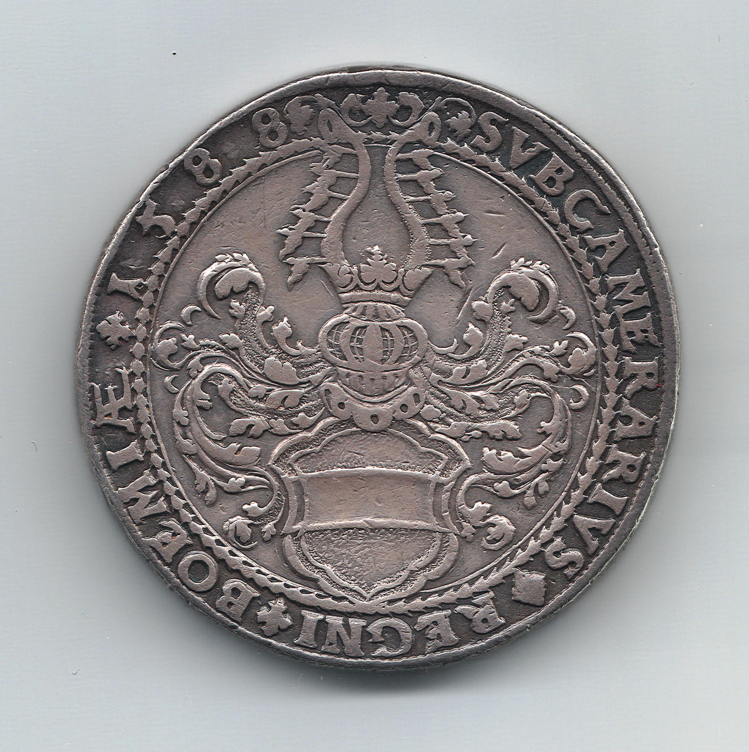 medaile Buriána Trčky z Lípy 1588 revers